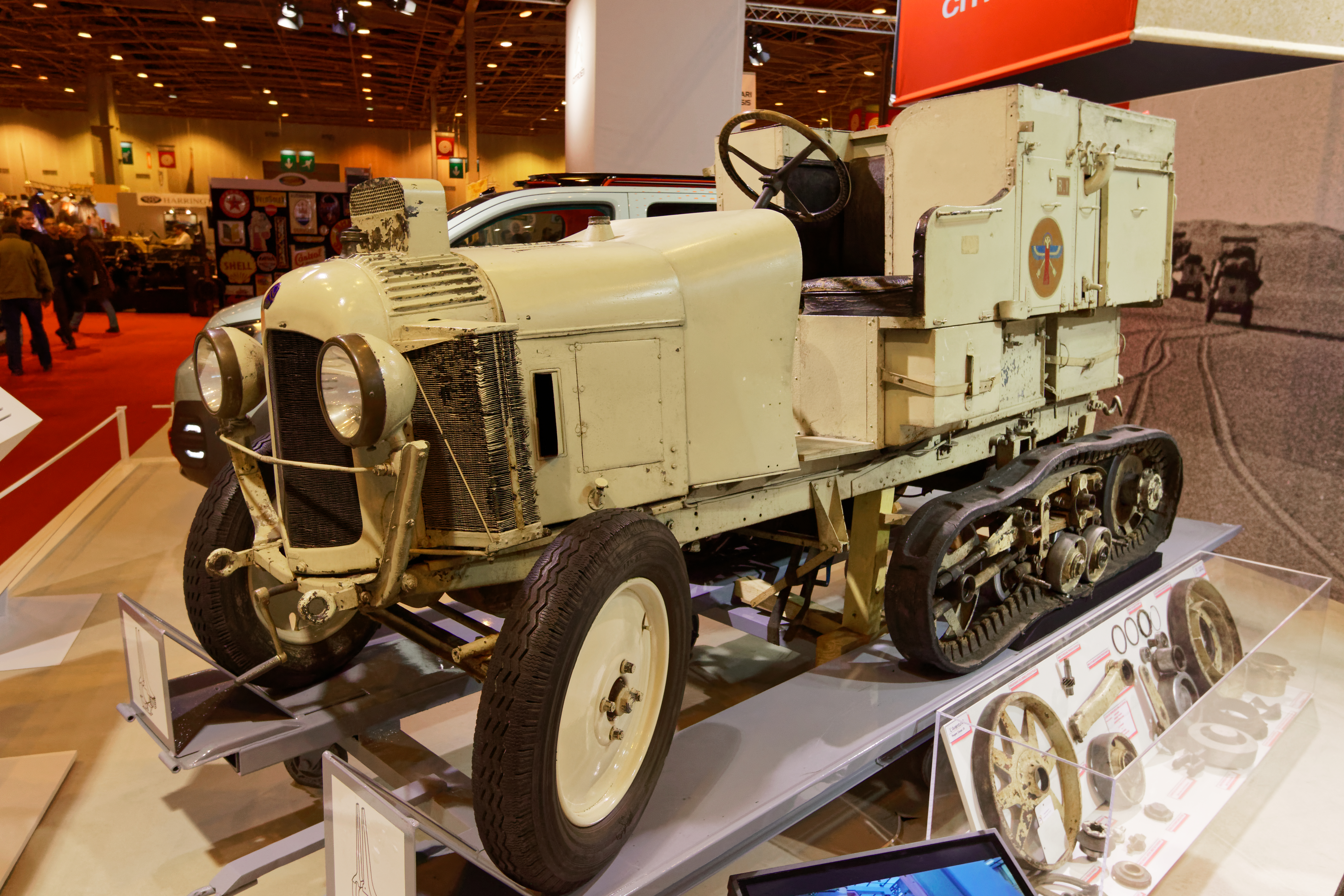 Une Citroën autochenille B2 "Scarabée dOr" de 1922 exposée lors du salon Rétromobile 2017. Reconstruction à l'identique du véhicule qui traversa le Sahara en 1922. il a relié les villes de Toggourt à Tombouctou en 21 jours du 17 décembre 1922 au 7 anvier 1923